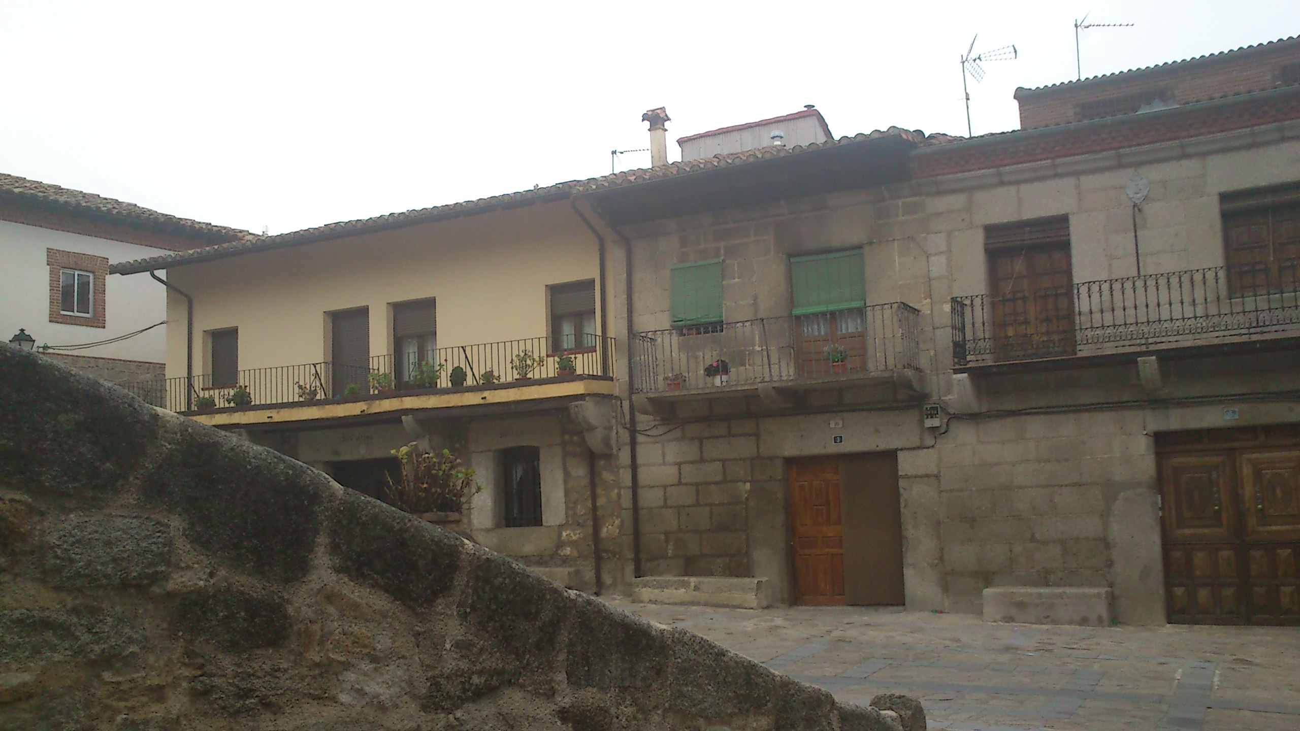 Arquitectura típica Villarejo del Valle